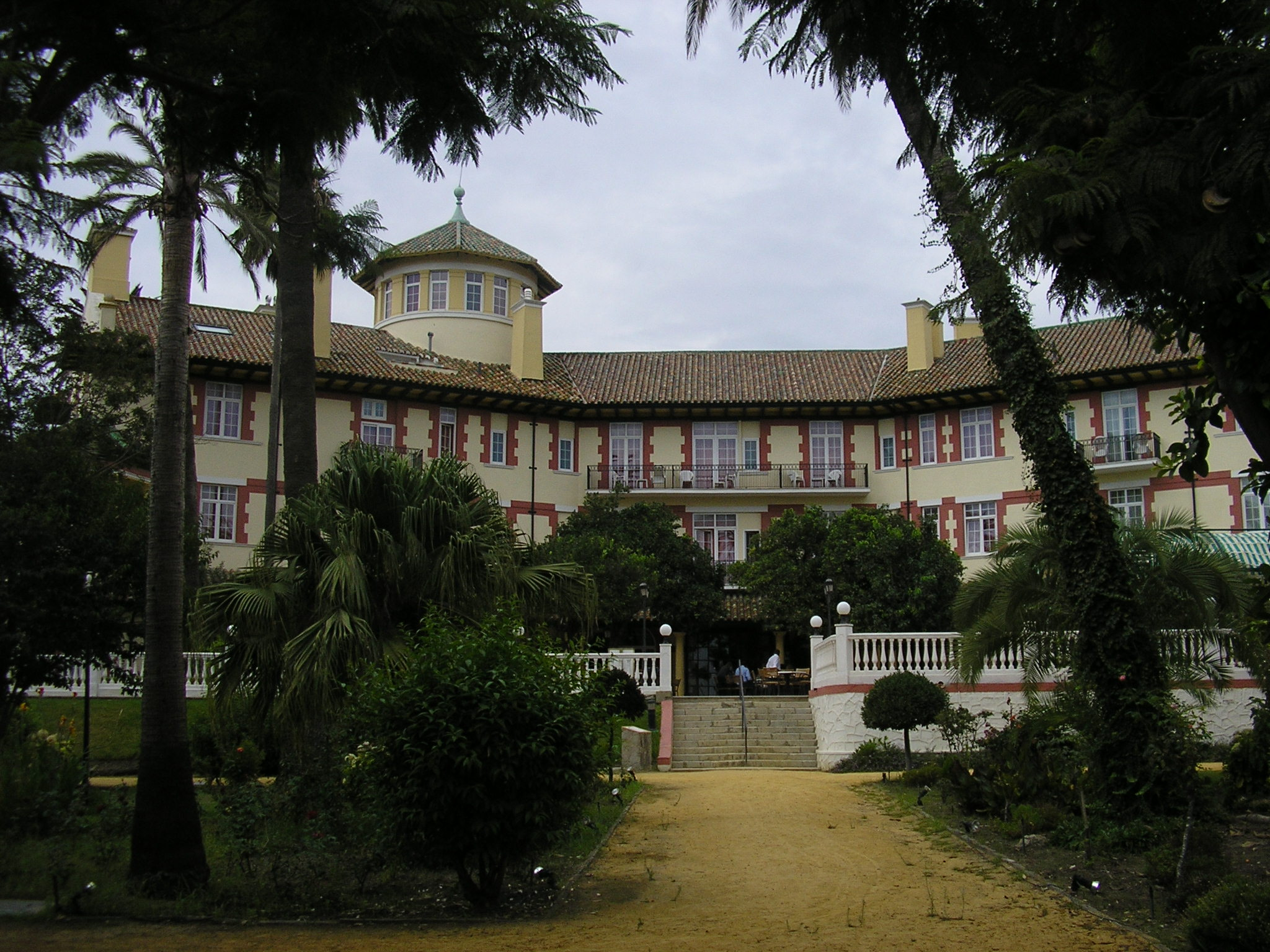 Hotel reina Cristina de Algeciras, Andalucía, España.